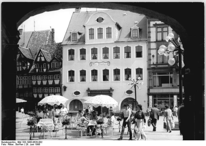 Quedlinburg, Marktplatz, Haus "Grünhagen" ADN-ZB Ritter 28.6.86 Bez. Halle: Städteporträt Quedlingburg-Von den vielen historischen Bauten um den Markt herum sticht das "Haus Grünhagen", ein Spätbarockbau aus dem Jahre 1701, hervor. Das hochragende Patrizierhaus beherbergt die Musikschule des Kreises. Jährlich verlassen etwa 15 Schüler die Ausbildungsstätte. Unterrichtet wird in den Fächern Horn, Trompete, Klarinette und Klavier.-siehe auch 1986-0628-1, 3 und 4N